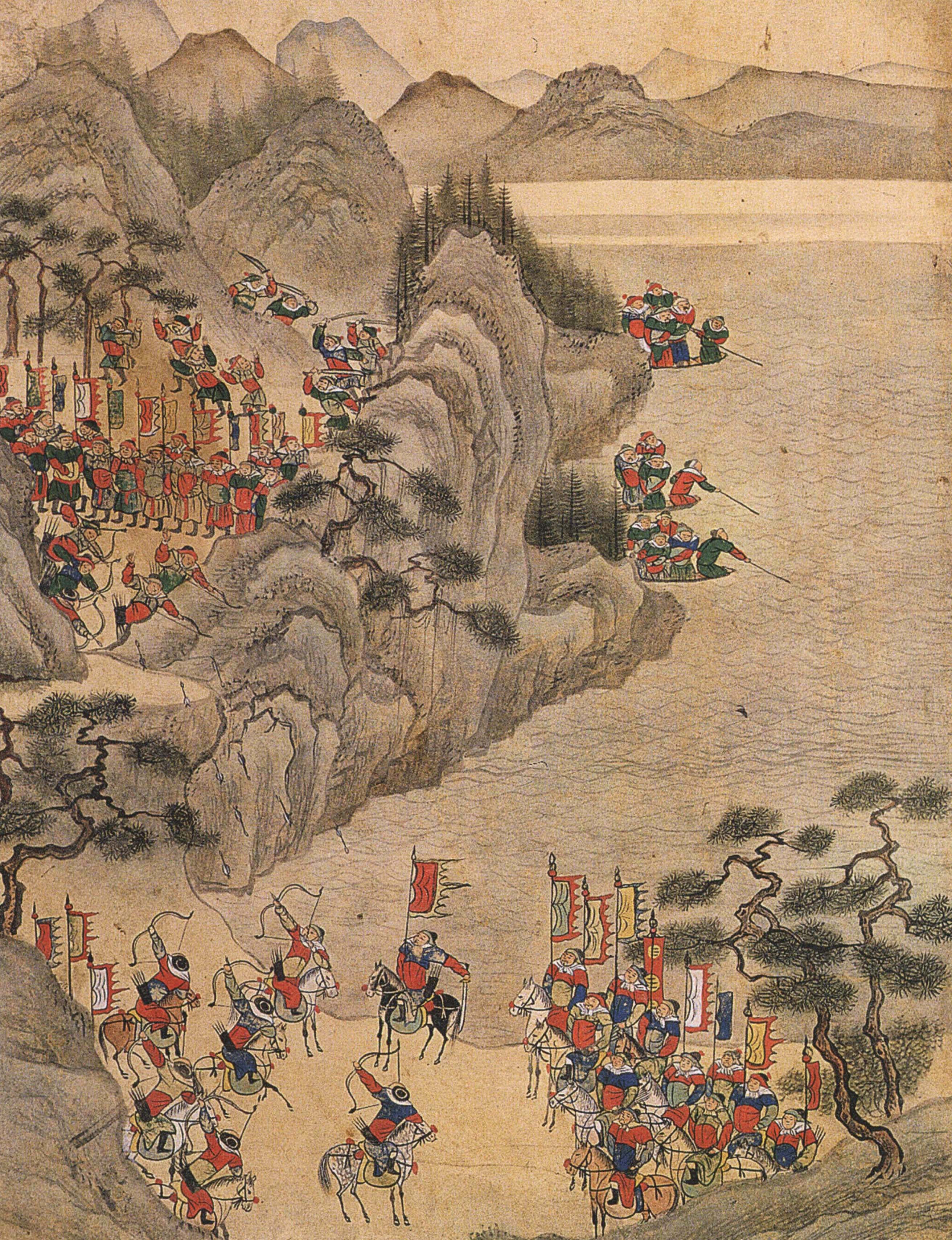 북관유적도첩(北關遺蹟圖帖)-출기파적도(出奇破賊圖)